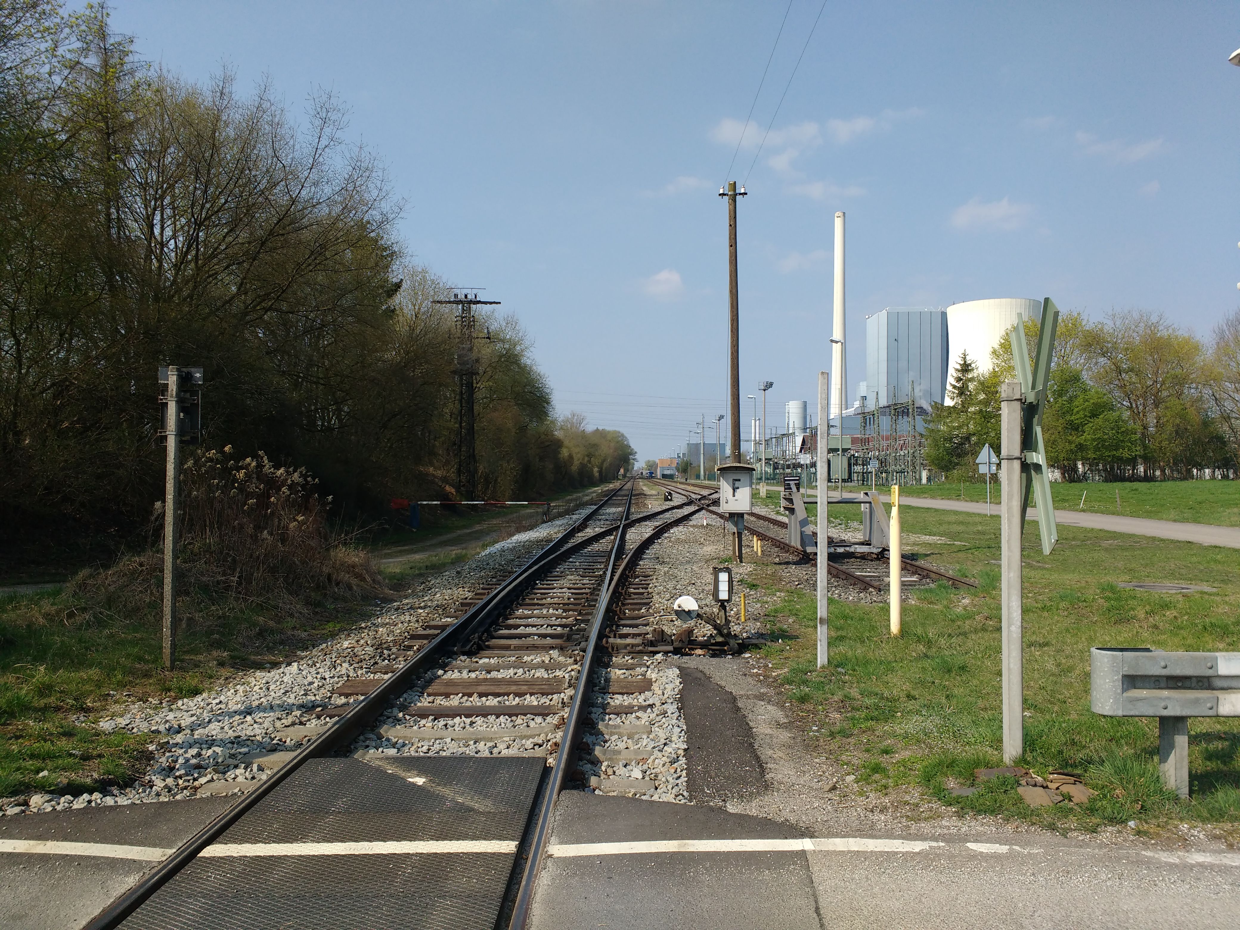 Hallertauer Lokalbahn zwischen Haag an der Amper und dem Kraftwerk Zolling